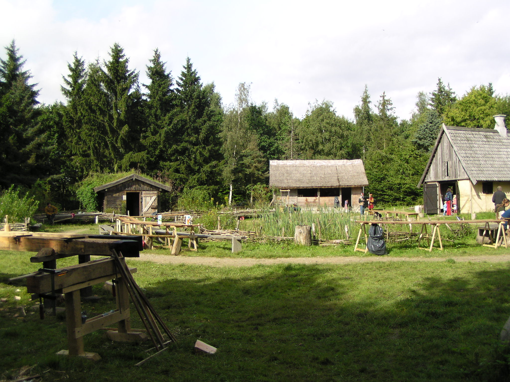 Middelalderlandsbyen ser næsten tom ud